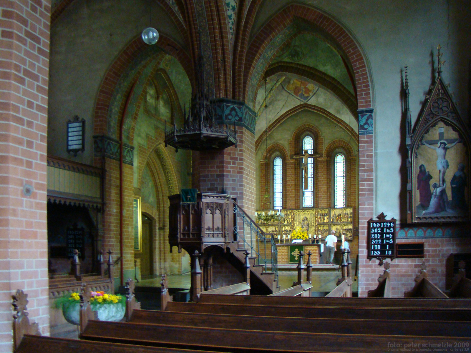 Marienkirche in Gnoien